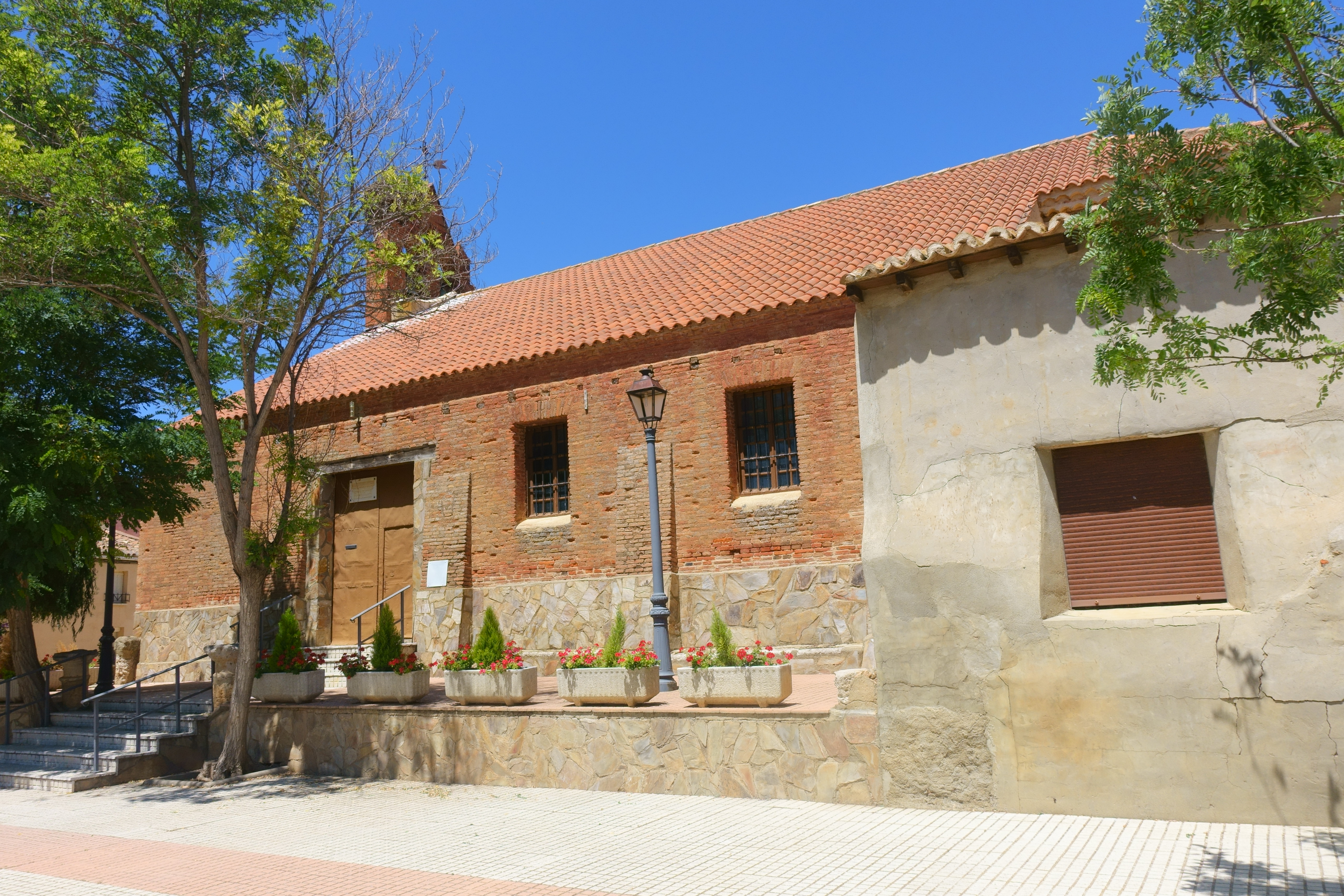 Iglesia de San Pedro, Cotanes del Monte (Zamora, España).